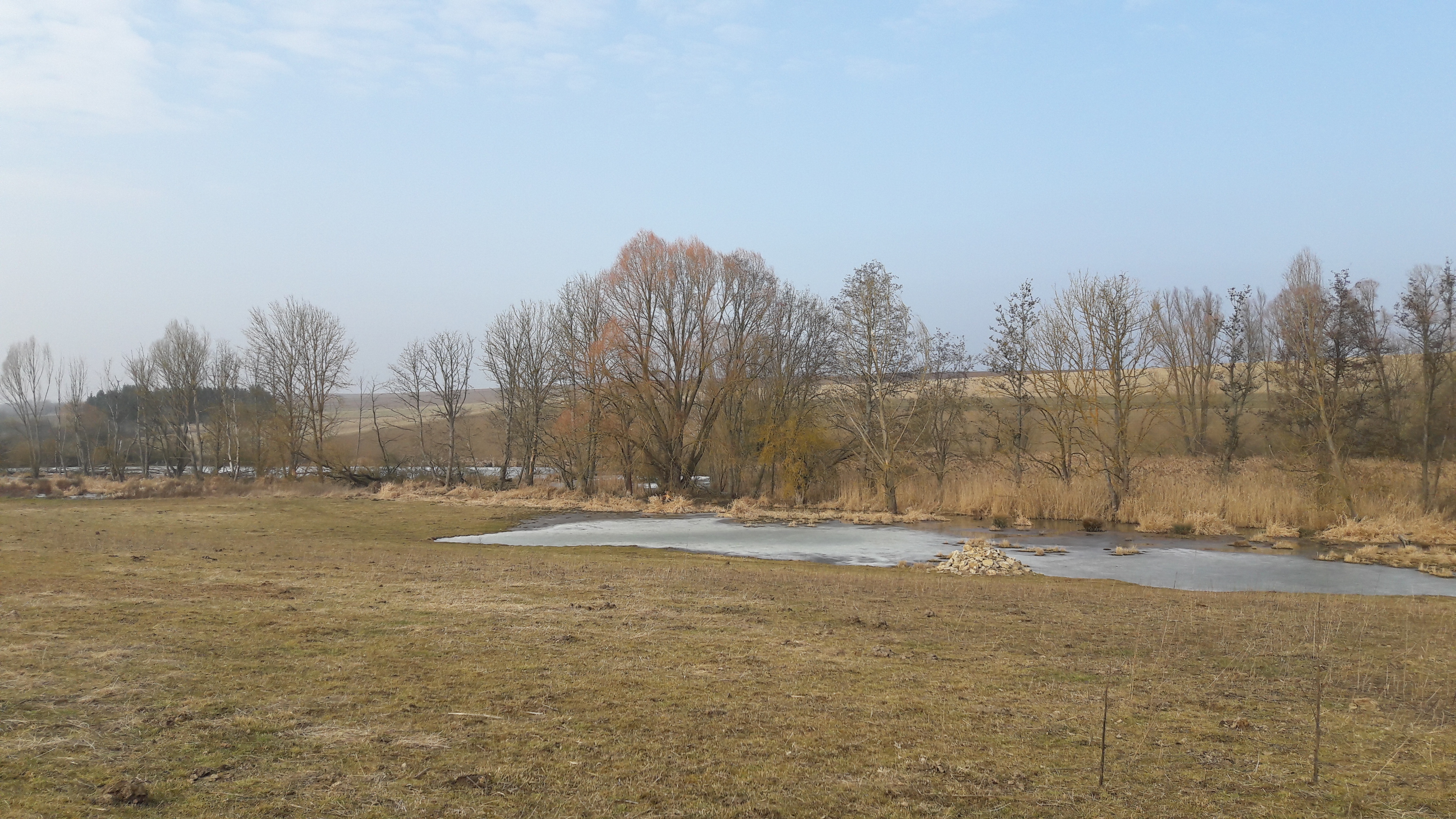 Büttharder Straße (Unterwittighausen, 2017) Auf dem Bild ist ein Teil des Gebiets Wiesenweihe Taubergrund zu sehen, das mit Verordnung vom 20. November 2007 des Regierungspräsidiums Stuttgart als Europäisches Vogelschutzgebiet (Schutzgebietskennung DE-6425-441) im baden-württembergischen Main-Tauber-Kreis in Deutschland ausgewiesen wurde. Das Bild zeigt ebenfalls Teile der Naturdenkmale Feuchtgebiet an der Riedquelle und Feuchtgebiet Ried.